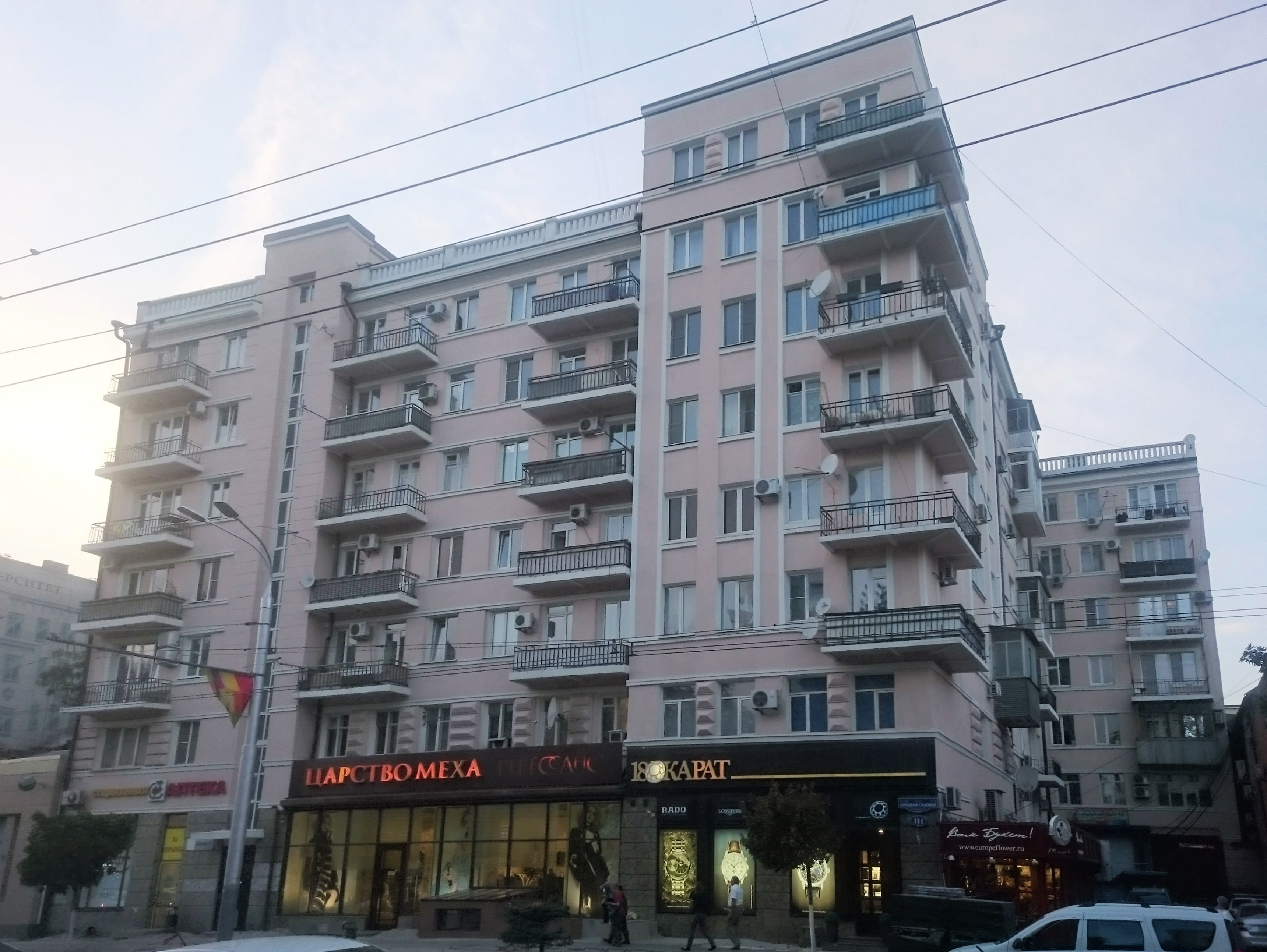 Дом, в котором с 1943 по 1960 г. жил Д.И. Петров (Бирюк): ул. Б. Садовая, 111, Ростов-на-Дону, Ростовская область